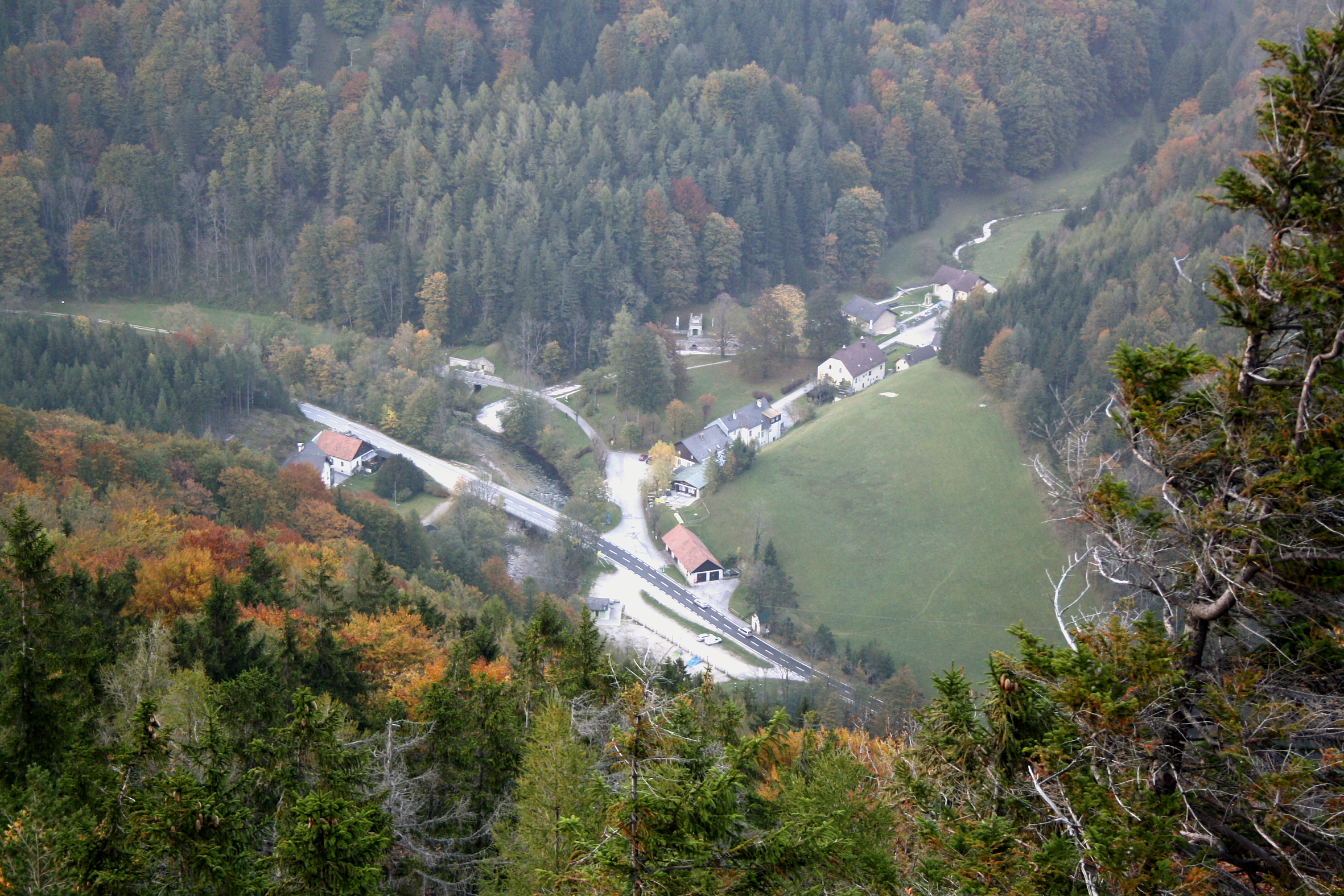 Kaiserbrunn von Südwesten (der Brandschneide) aus gesehen.